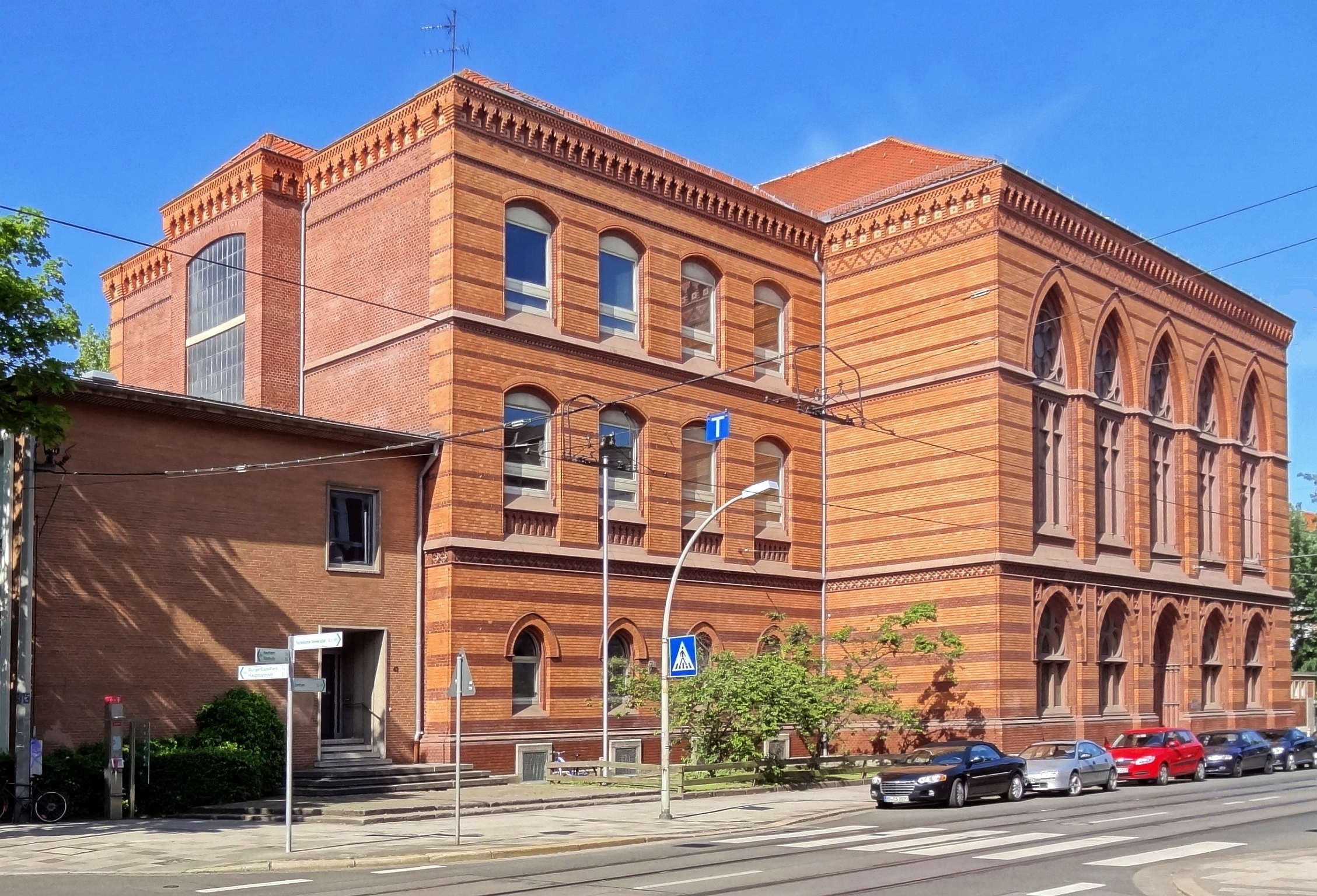 Straßenansicht des Wilhelm-Gymnasiums an der Leonhardstraße in Braunschweig, aus östlicher Richtung.